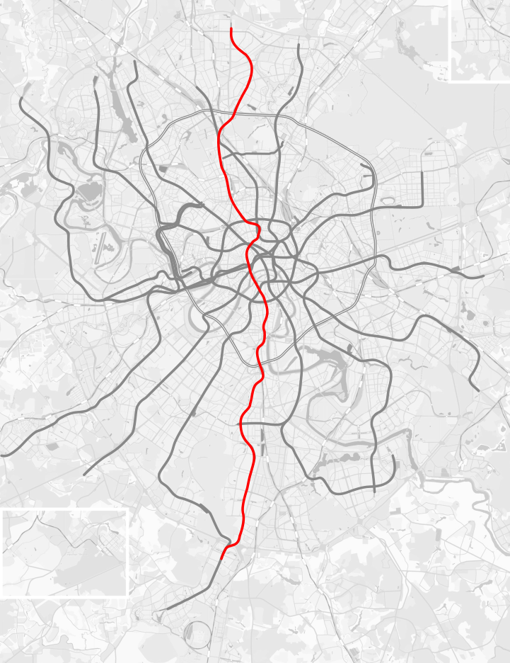 Серпуховско-Тимирязевская линия Московского метрополитена